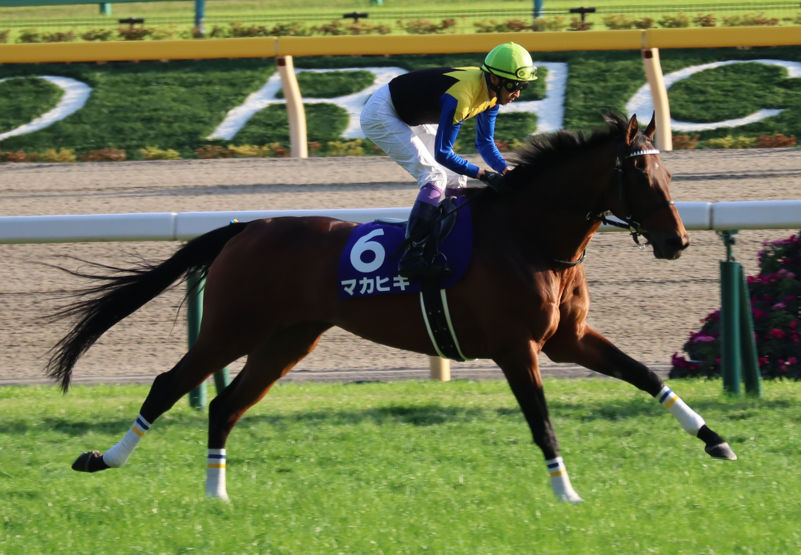 2018年天皇賞(秋)出走時